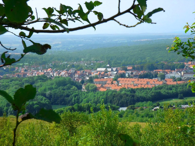 Desvres vue du Mont Pelé